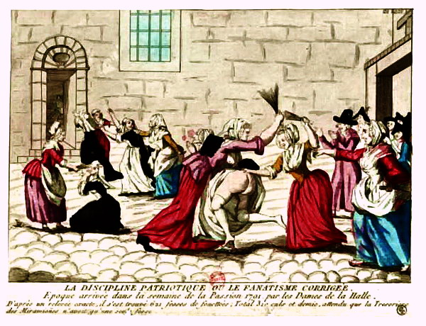 Des femmes corrigeaient les citoyennes qui se montraient mauvaises patriotes